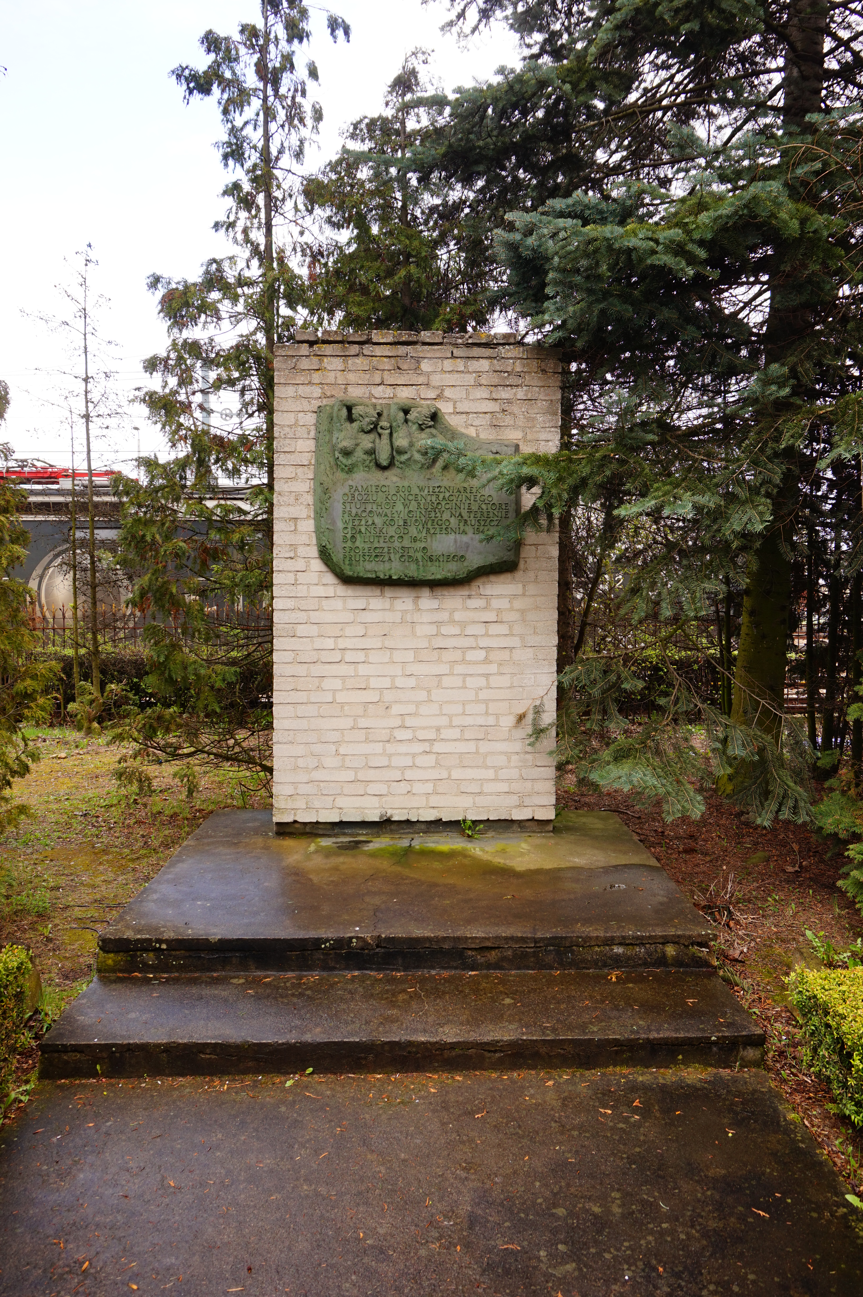 Pruszcz Gdański. Pomnik pamięci więźniarek KL Stutthof